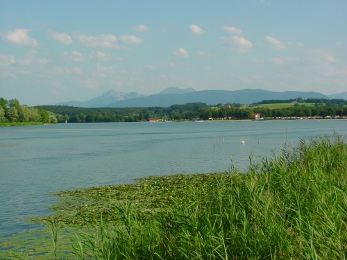 Waginger See von Tettenhausen